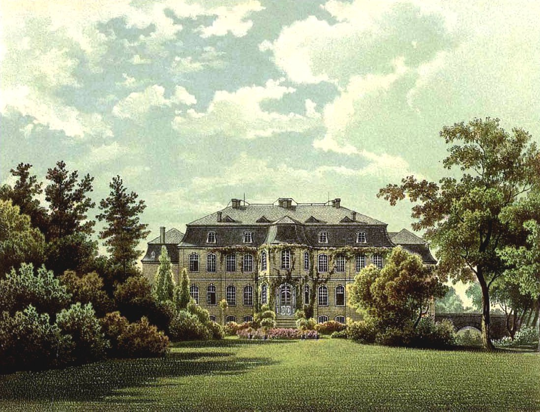 Schloss Wahn, Kreis Mülheim am Rhein, Rheinprovinz, Lithografie aus dem 19. Jahrhundert